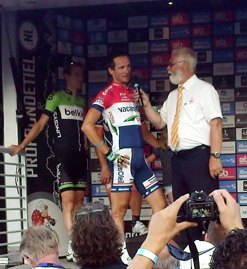 Johnny Hoogerland, winnaar Ronde Van Tiel 2013